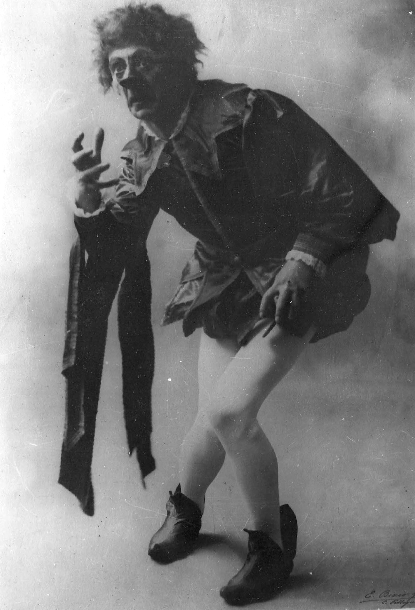 Arturo Podestá en una de sus creaciones escénicas.